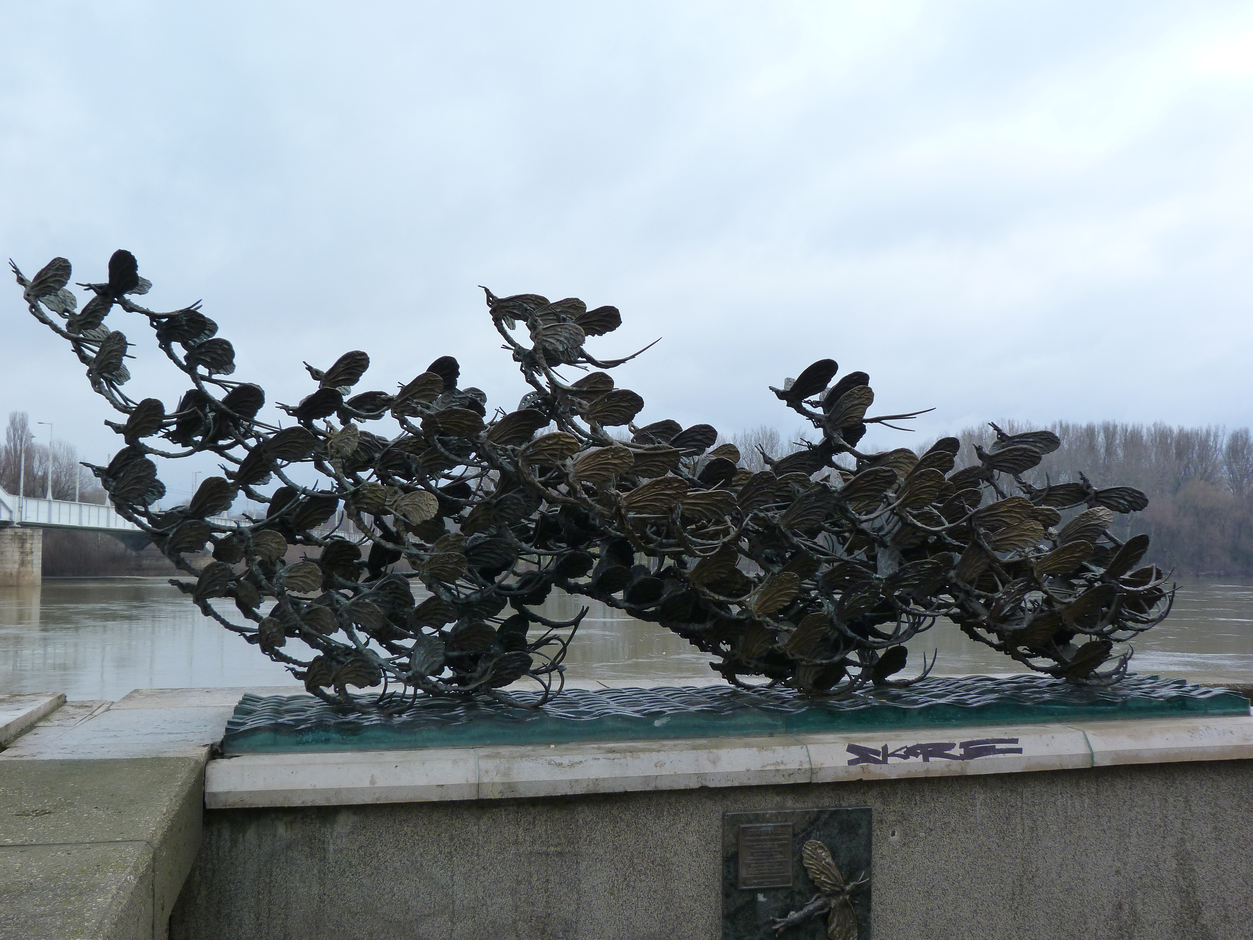 Farkas Pál Tiszavirágzás című szobra Szegeden (1998), a rakparton